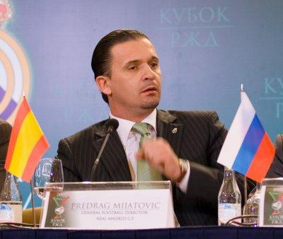 Predrag Mijatović